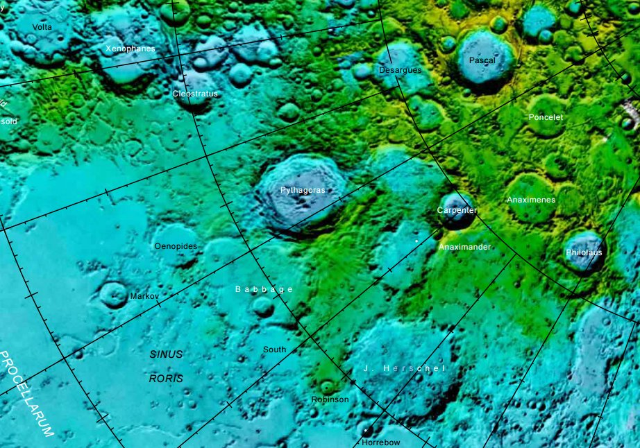 Cráter lunar Oenopides. Localización. (Imagen LRO)